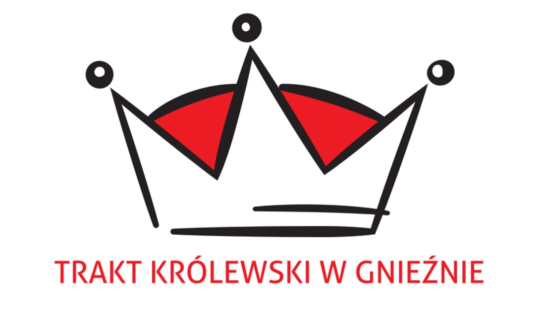 Znak graficzny Traktu Królewskiego w Gnieźnie – szlaku turystycznego Miasta Gniezna